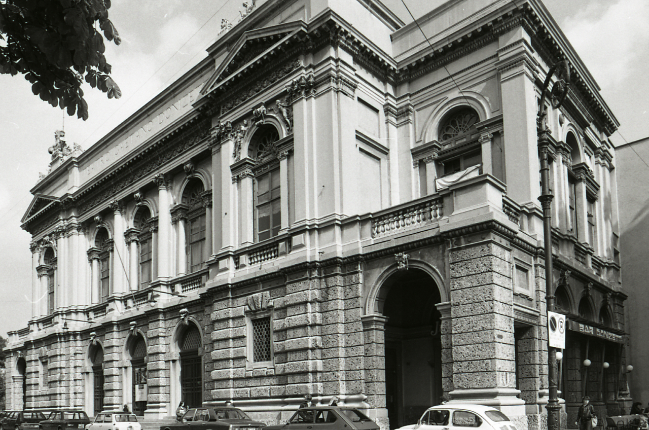 Servizio fotografico : Bergamo, 1981 / Paolo Monti. - Strisce: 1, Fotogrammi complessivi: 5 : Negativo b/n, gelatina bromuro d'argento/ pellicola ; 35 mm. - ((Sul portanegativi: N[I]K[MA]T FP4. - La serie è identificata da Monti con segni grafici e iscrizione inventariale, e distinta dalla successiva. - Occasione: Documentazione per la pubblicazione: Fumagalli Alberto, "Bergamo: origini e vicende storiche del centro antico", Milano, Rusconi immagini, 1981. - Fonte: Agenda di Paolo Monti: Nikon Leika 3001-/ Monti 1978 (1978-1982), presso Archivio Paolo Monti. - Fonte: Fattura di Paolo Monti: IV. Commesse/ Fattura n. 15/ Vostro volume illustrato Bergamo Alta (1980/05/18), presso Archivio Paolo Monti. Servizio fotografico in b/n per le illustrazioni del volume. Alla Società Rusconi vengono ceduti tutti i diritti di riproduzione anche per le eventuali coedizioni estere. - Fonte: Monografia di Fumagalli, Alberto: Bergamo: origini e vicende storiche del centro antico, Milano, Rusconi immagini (1981)